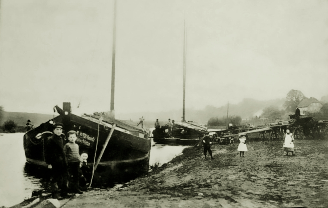 Binnenhafen Boizenburg/Elbe um 1895.